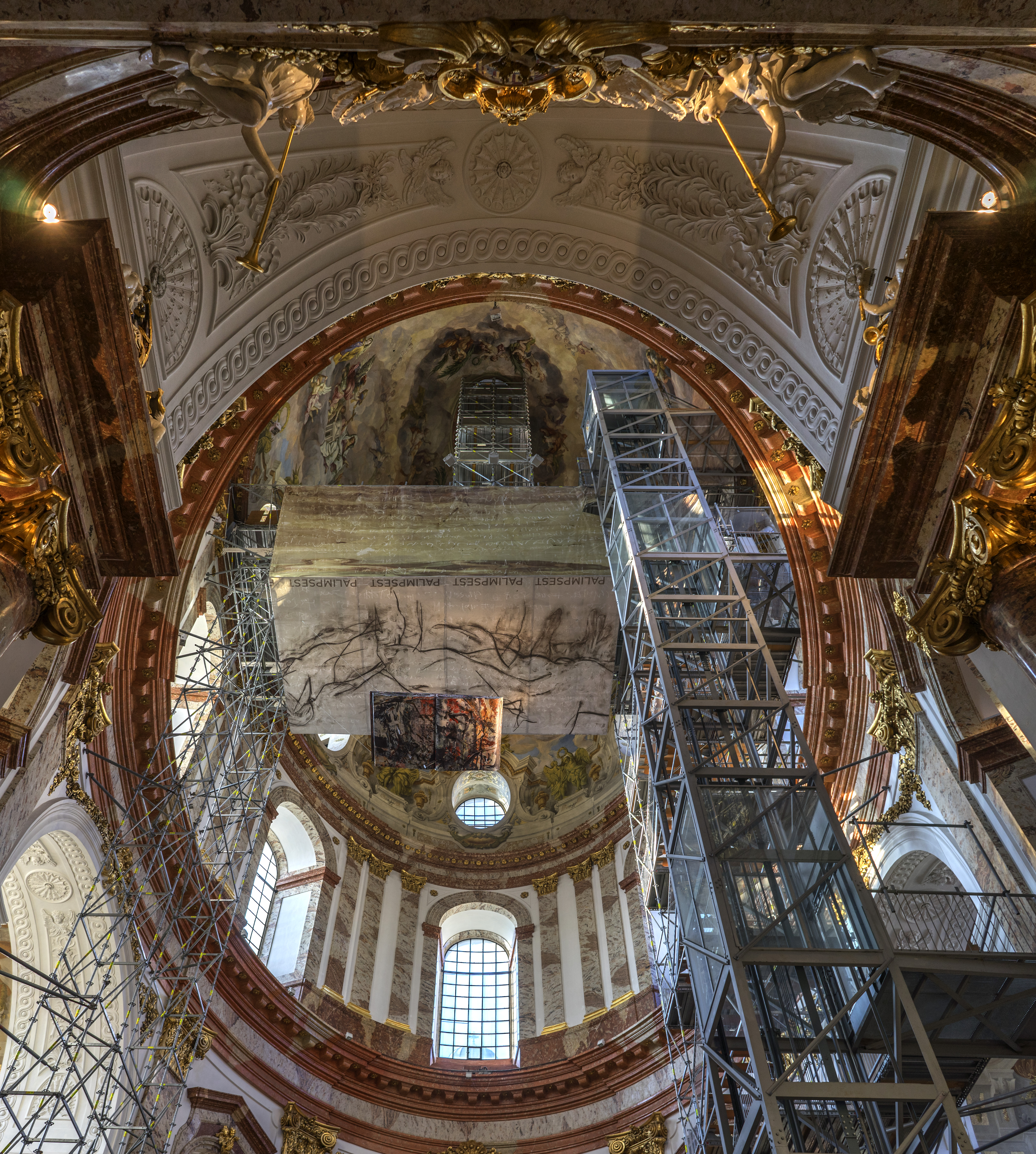 Kath. Pfarrkirche, Pfarrkirche Hl. Karl Borromäus (Karlskirche)